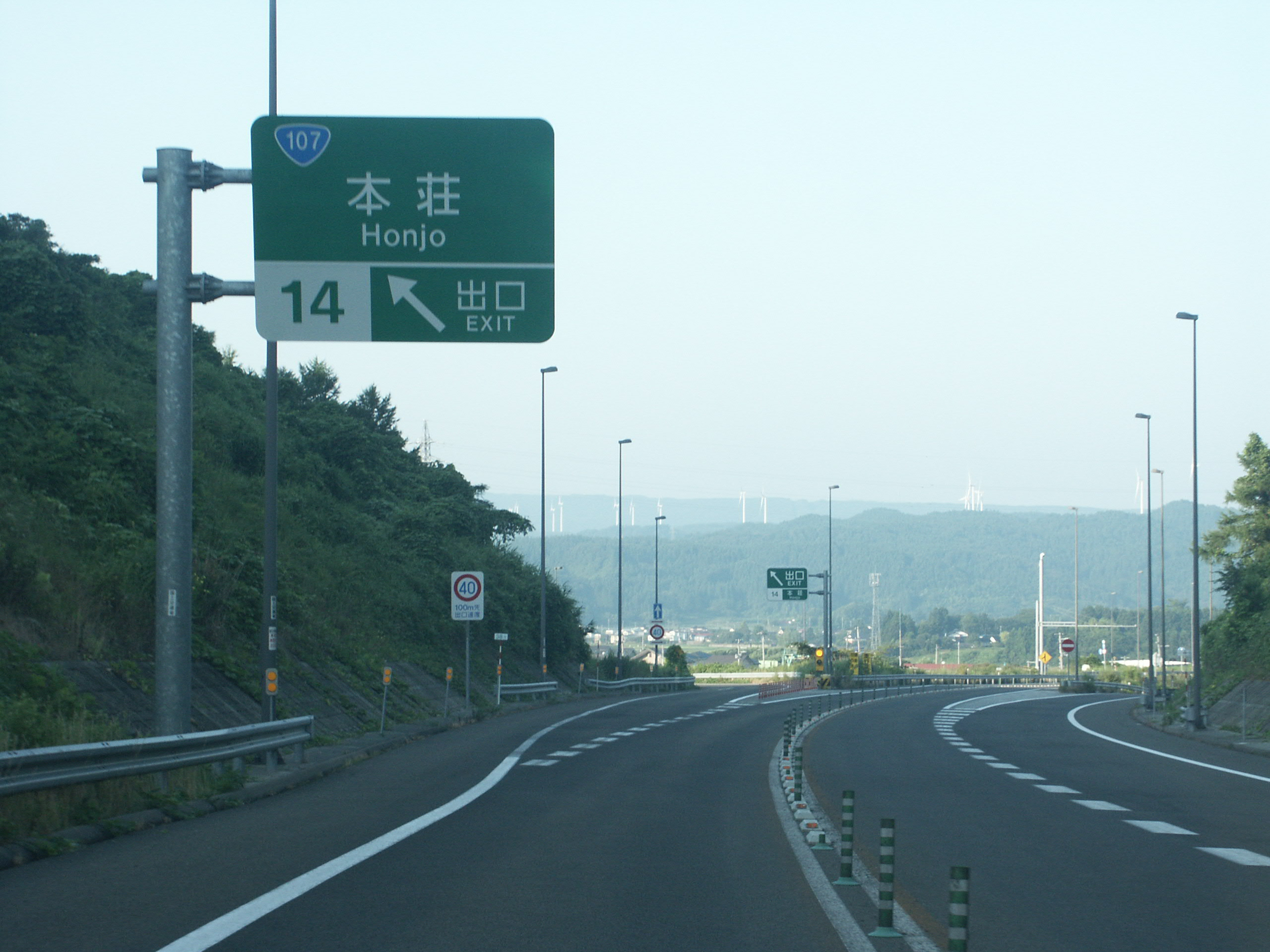 日本海沿岸東北自動車道 本荘IC出口（秋田市方面側）